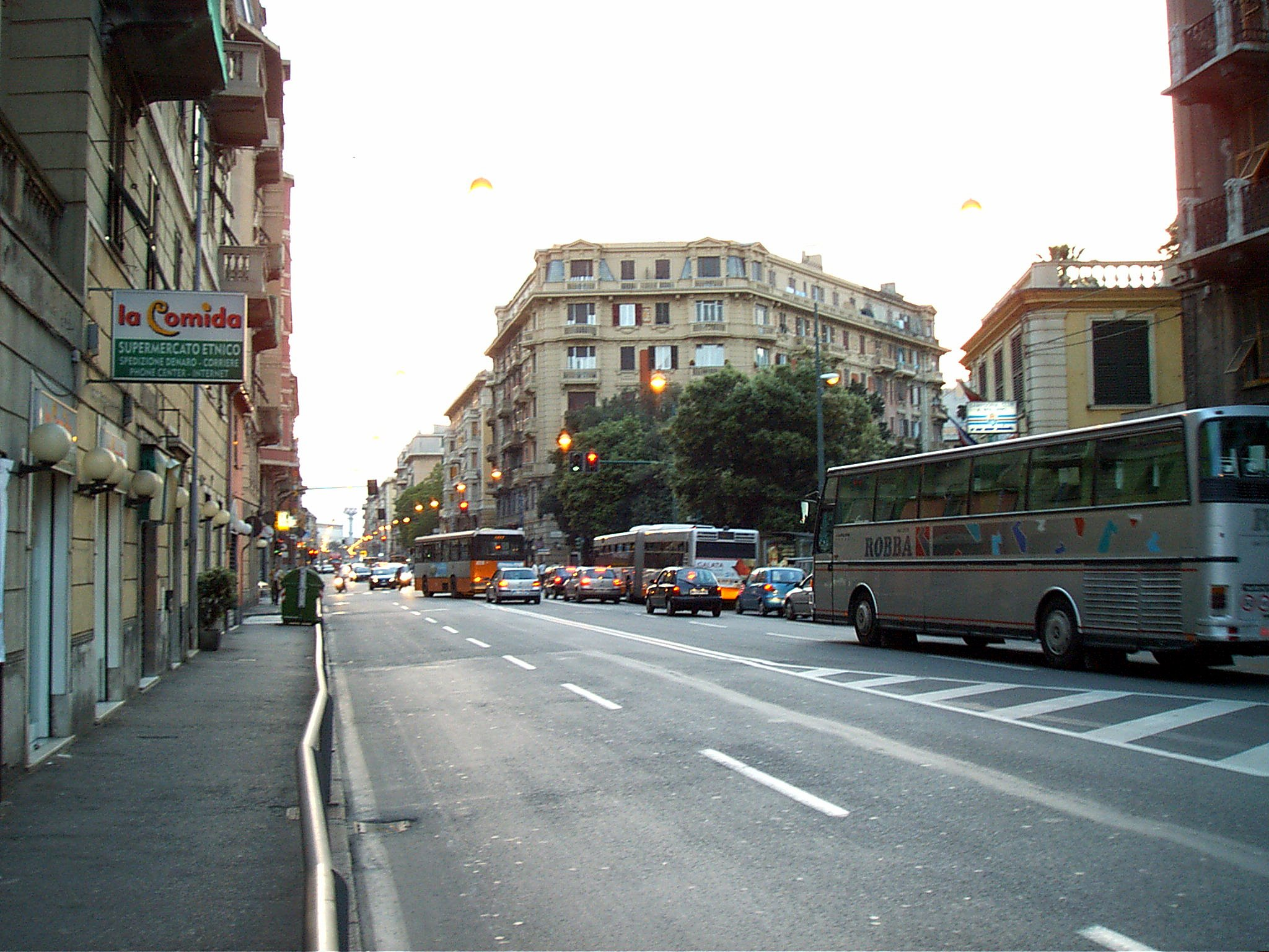 Via Cornigliano, nell'omonimo quartiere di Genova.